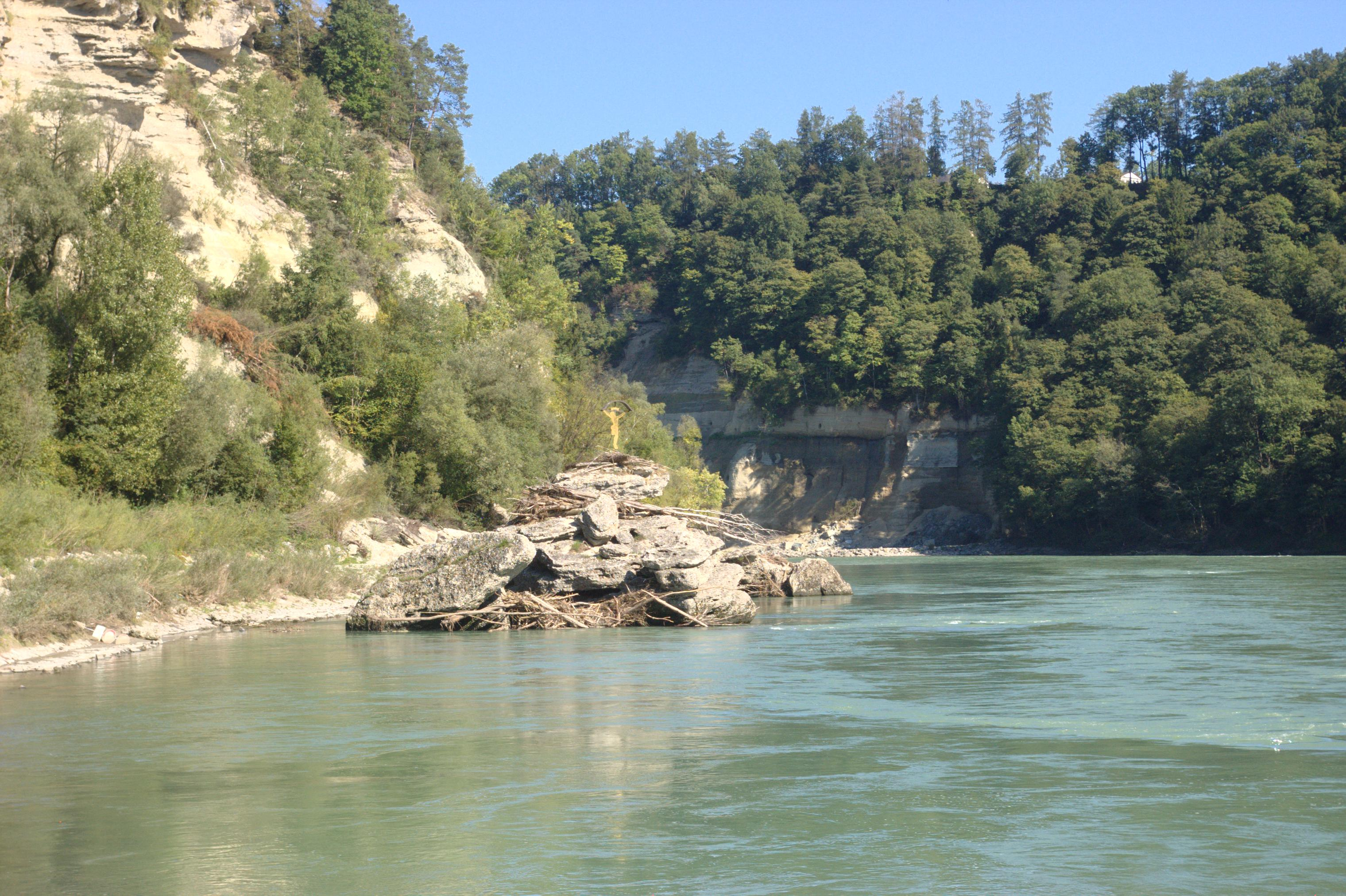 Kreuzfelsen mit Blechkreuz in der SalzachThis is a photograph of an architectural monument.